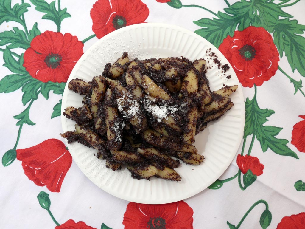 Mohnnudeln (beim Mohnblütenfest beim Mohnwirt in Armschlag)